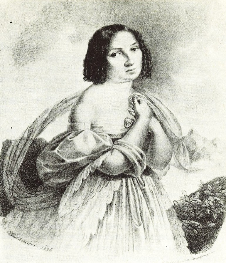 Déryné Széppataki Róza (1793–1872 színésznő portréja. Szathmáry Pap Károly litográfiája (1834)